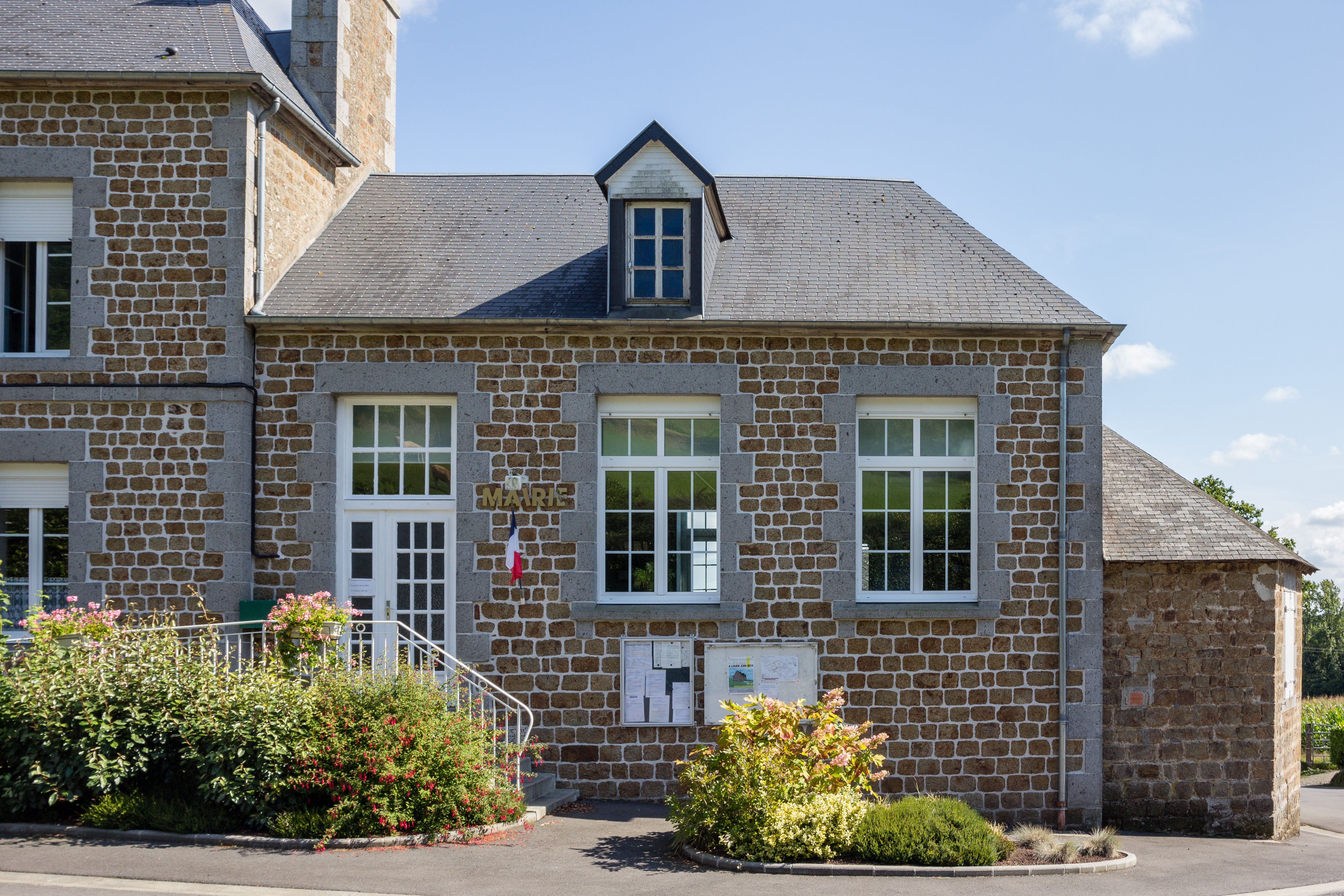 Mairie du Mesnil-Rainfray (France).